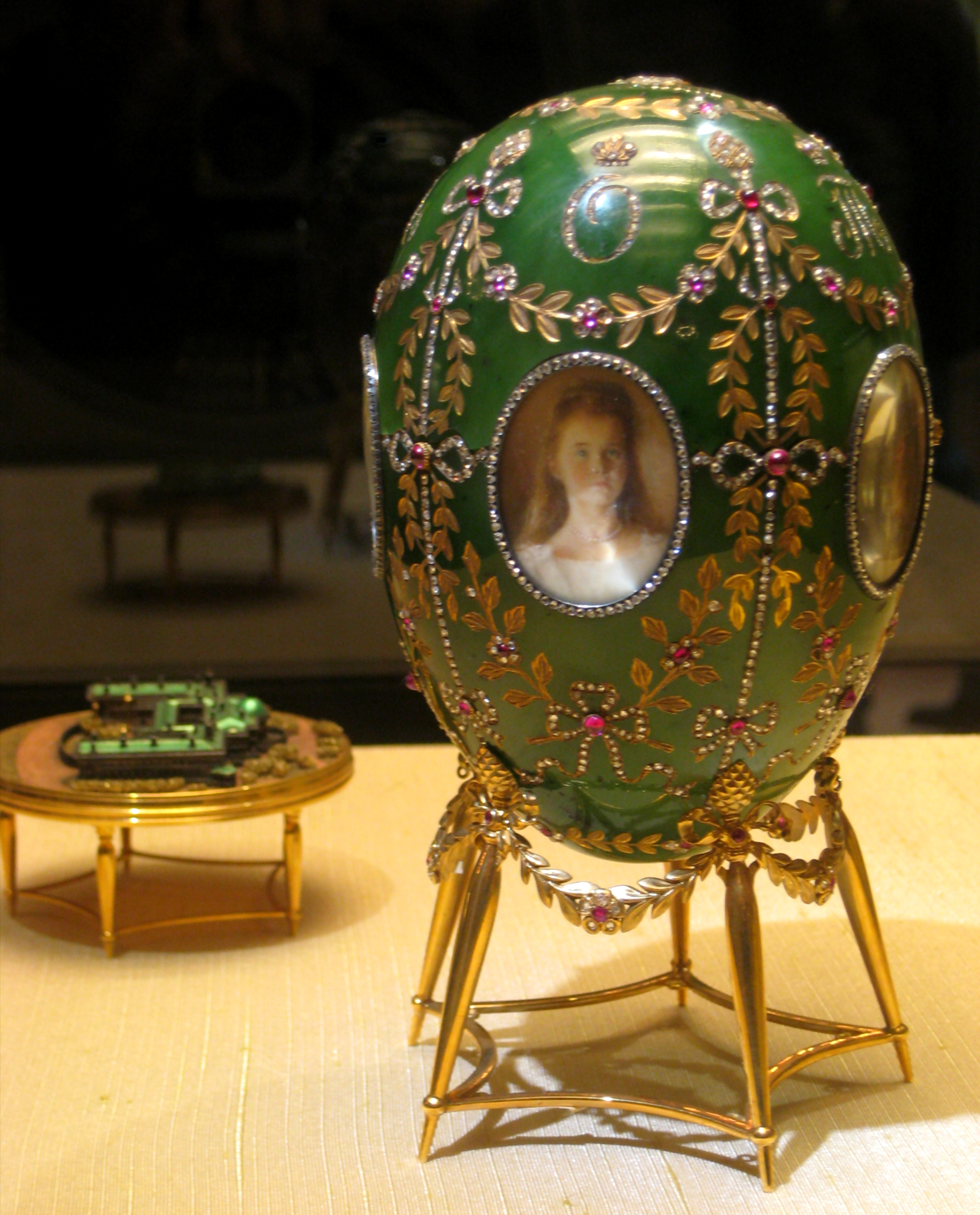 Яйцо Фаберже "Александровский дворец"